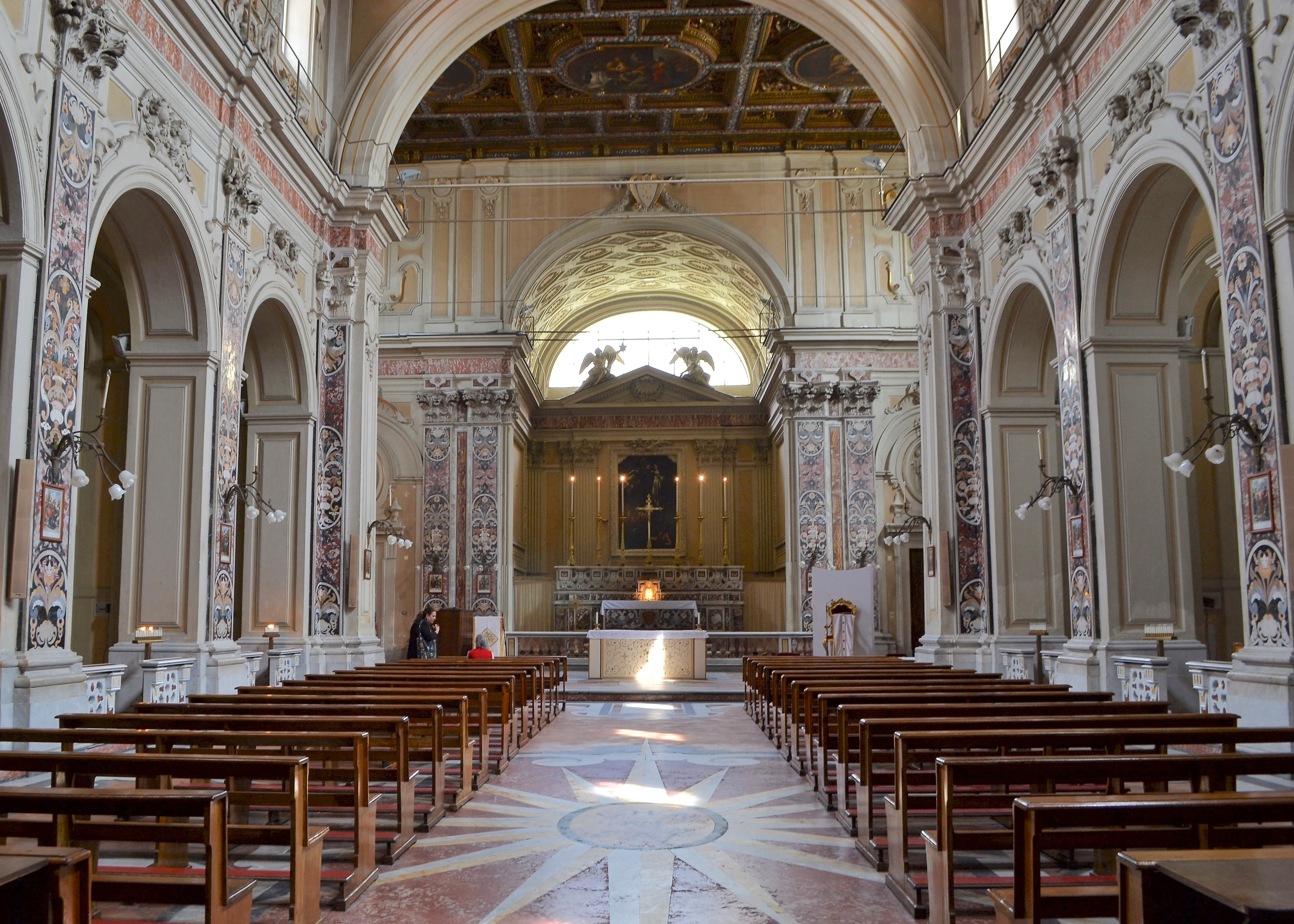 Santa Maria della Stella (Napoli, chiesa)